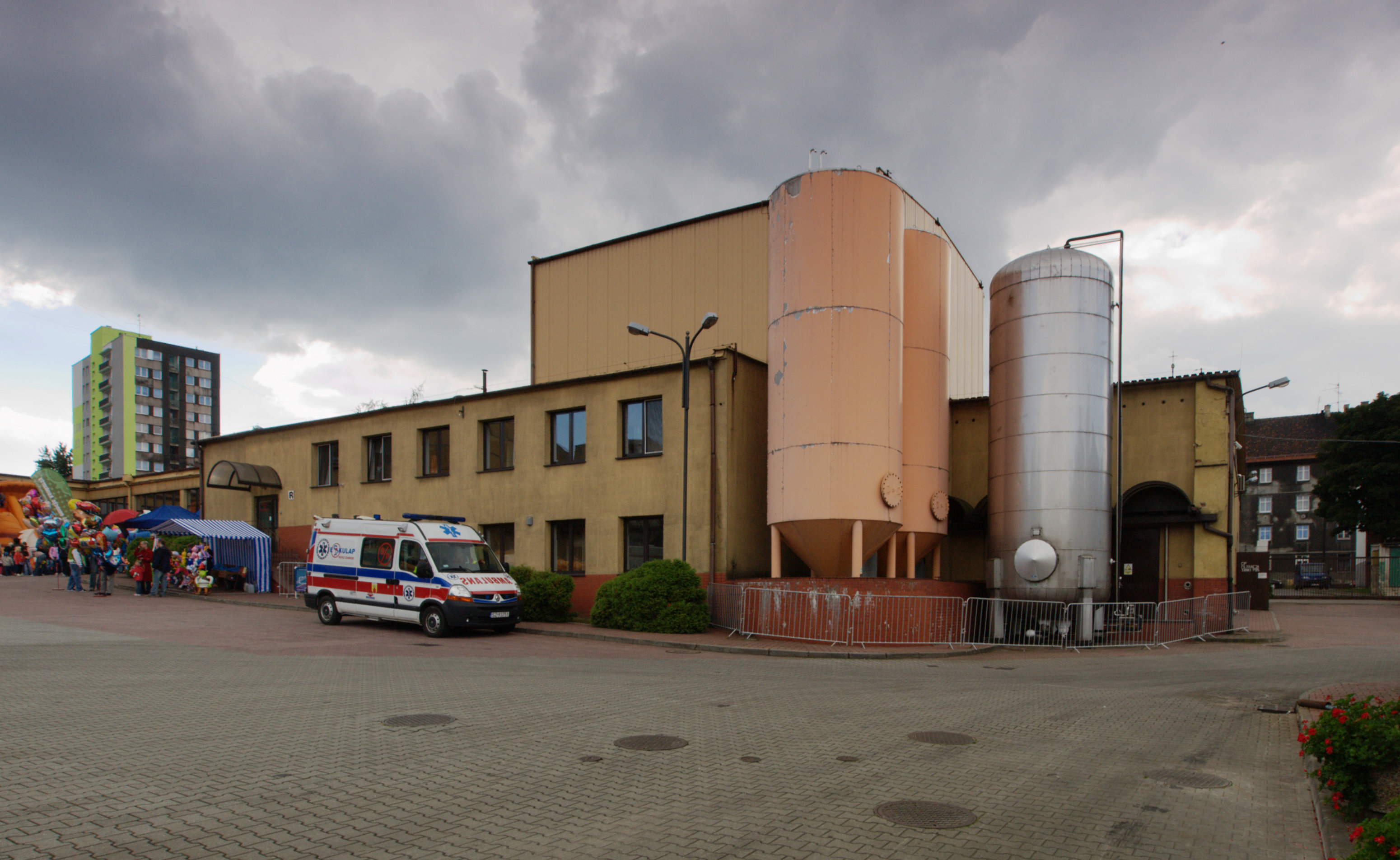 Browary Górnośląskie w Zabrzu. Budynek mieszczący instalacje filtracji piwa.